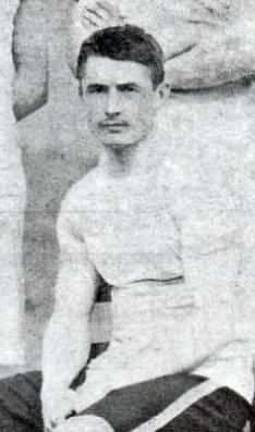 Alphonse Grisel, champion de France de saut en longueur en 1896.